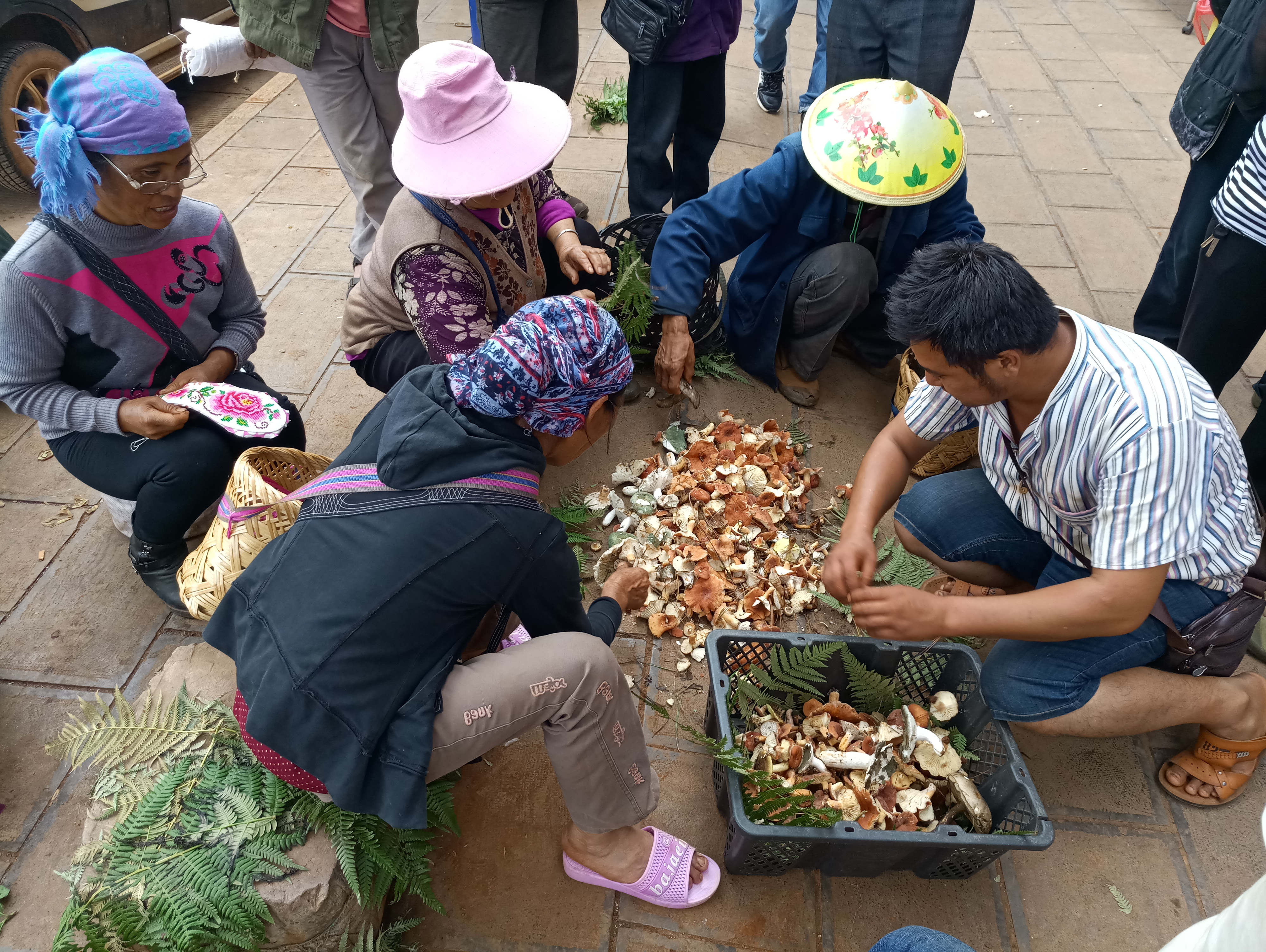 中文（中国大陆）: 圭山镇街头的菌摊